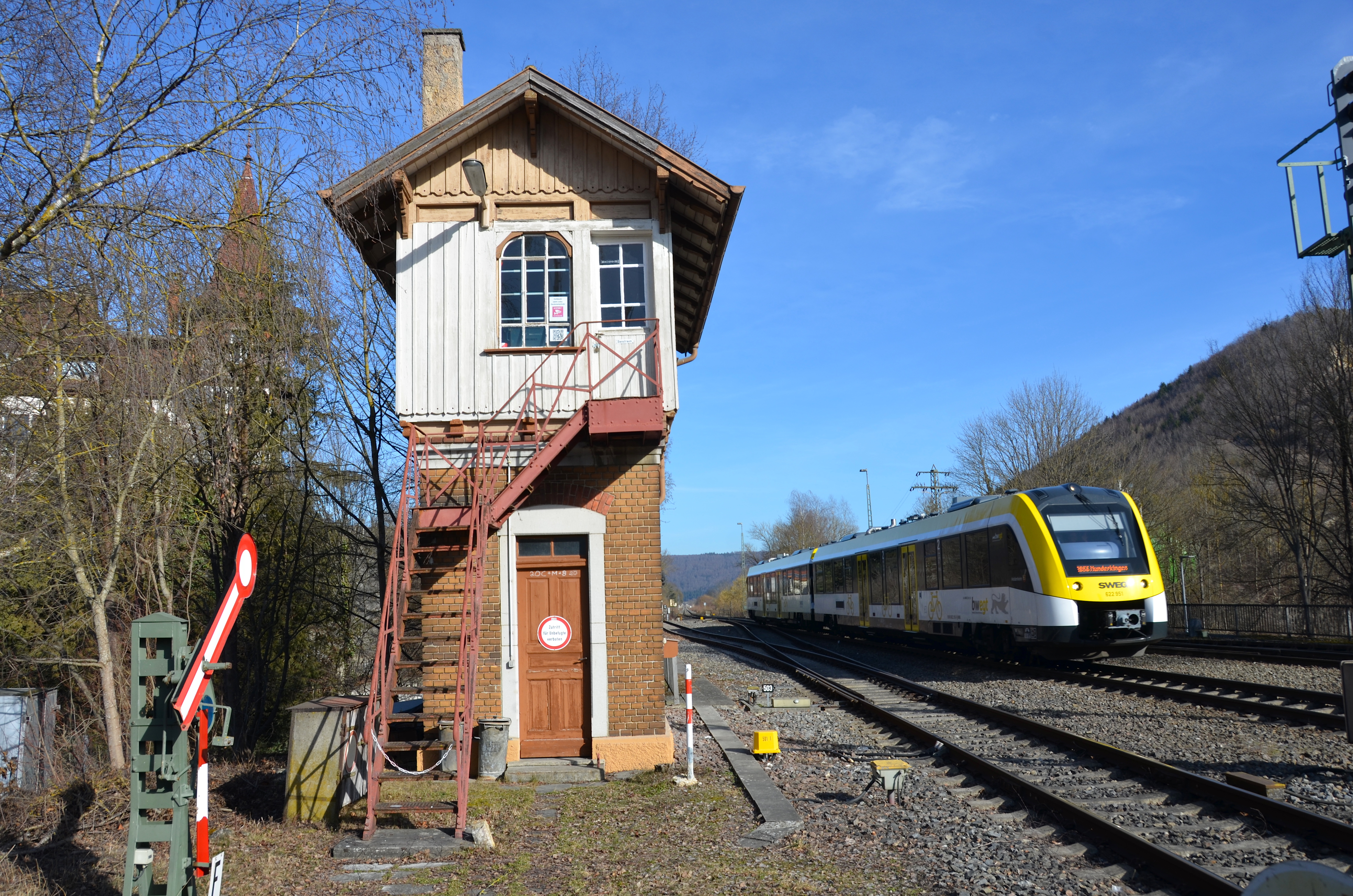 Historisches Stellwerk 1 in Schelklingen, Baden-Württemberg